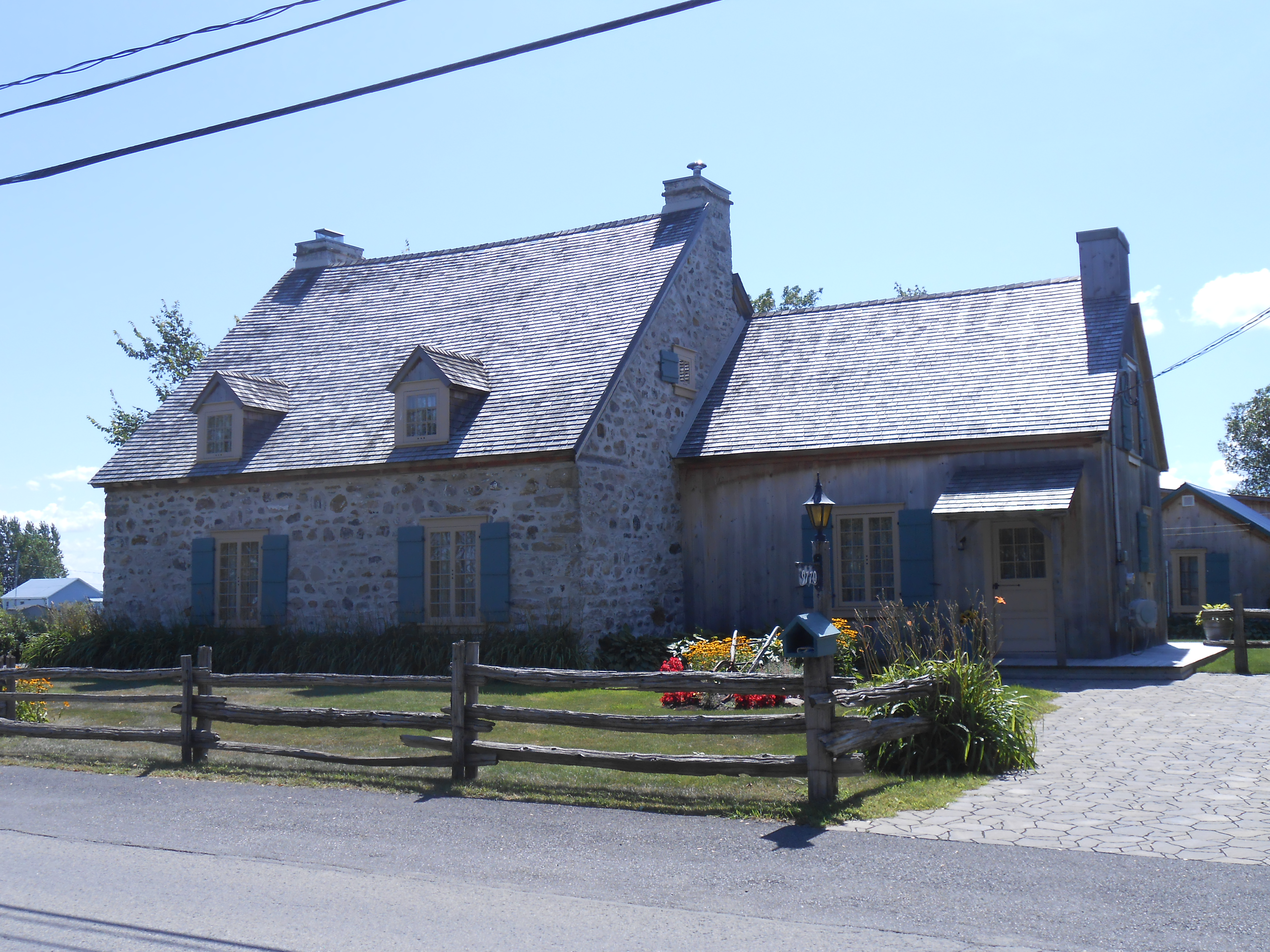 Maison Therrien, 9770, boulevard des Mille-Îles, Laval, Québec